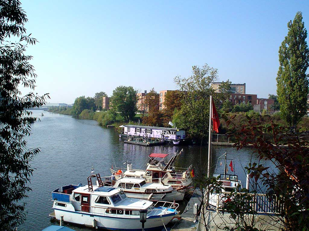 Blick von der Braunen Brücke in Hamburg-Hamm-Süd auf einen Motorboothafen, ein Hausboot (lila) sowie die neu gebauten Wohnungen der "Baugenossenschaft freier Gewerkschafter".